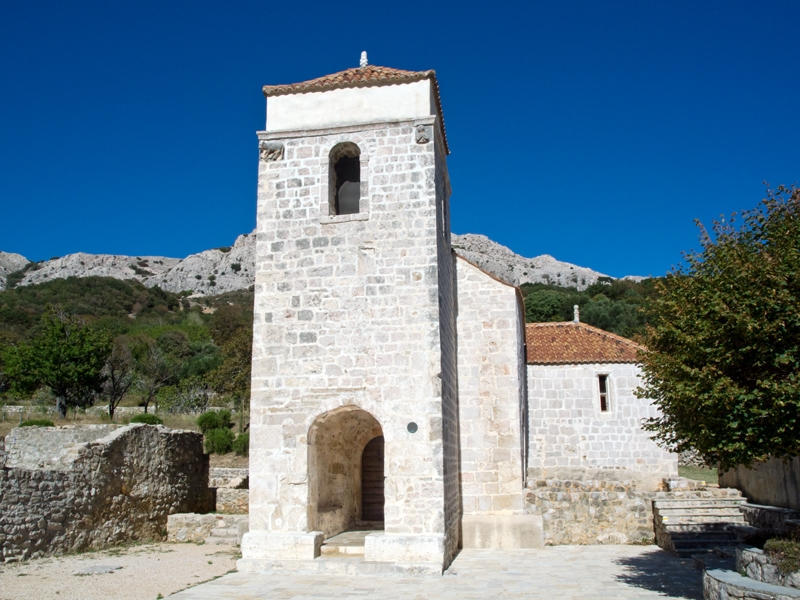 Crkva sv. Lucije u Jurandvoru